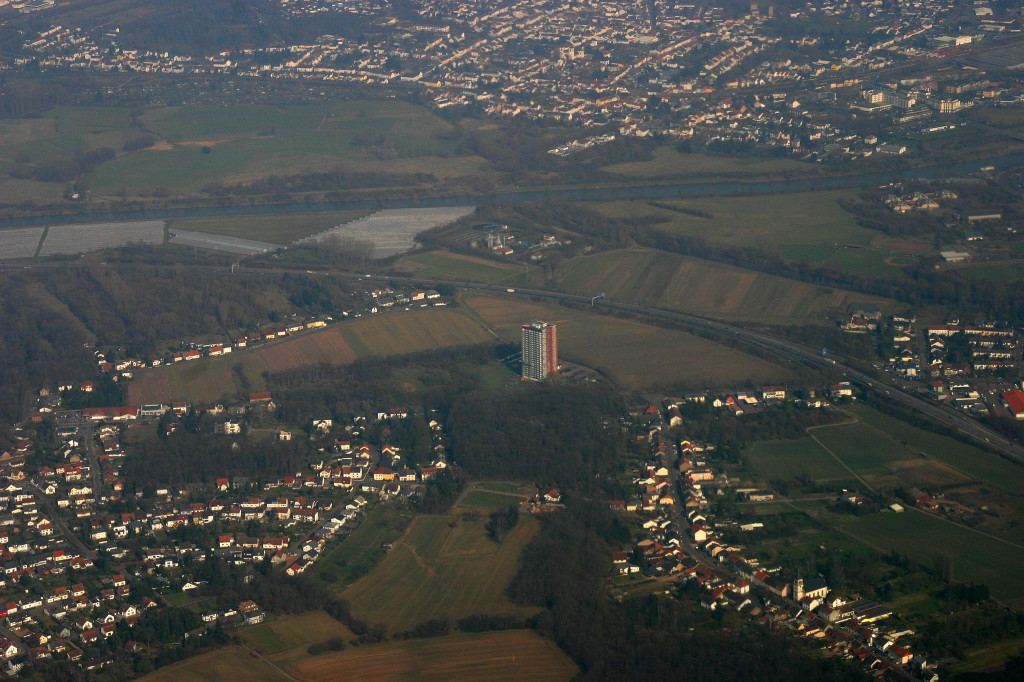 Fotoflug Saarland